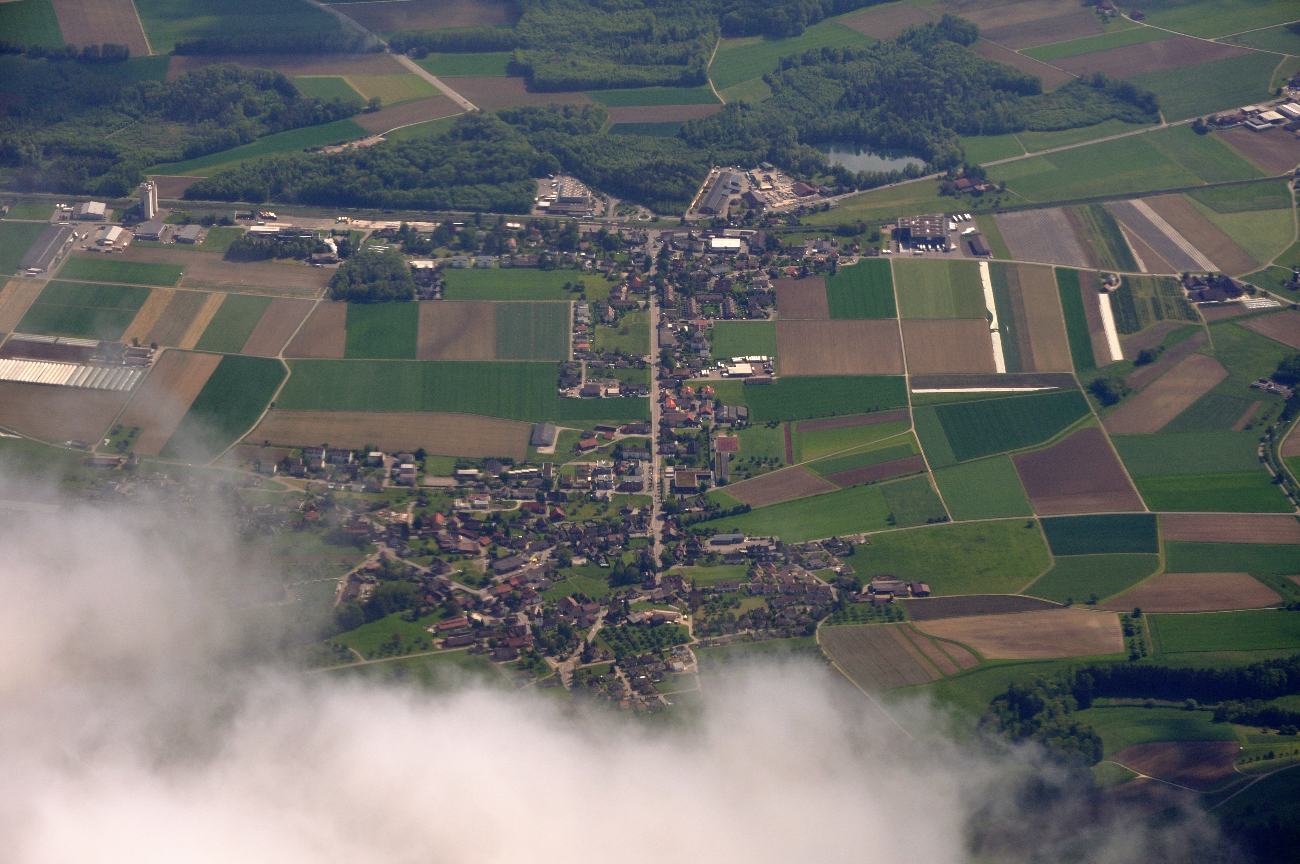 Switzerland, Thurgau, Märstetten from overhead Tägerwilen